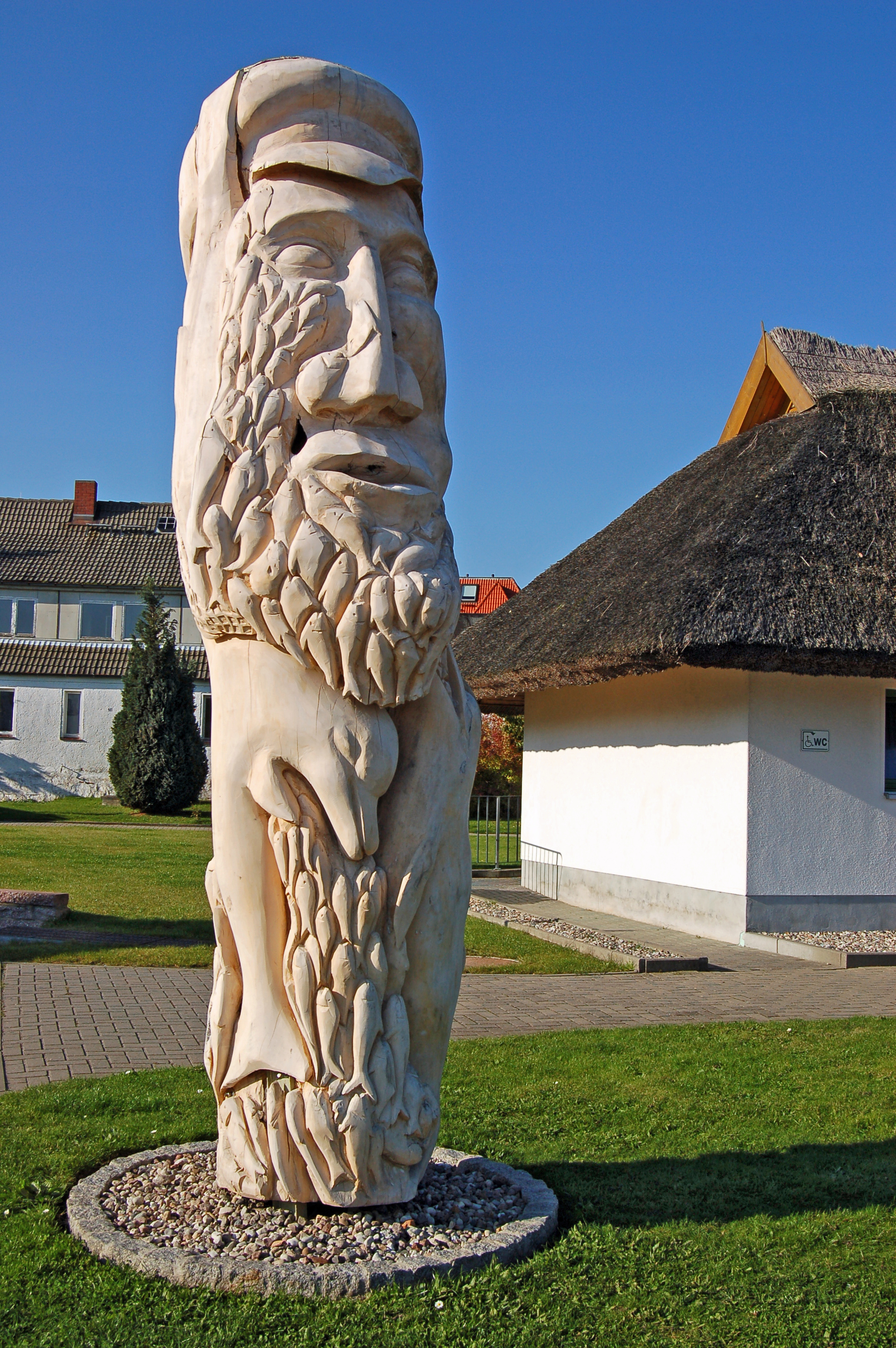 Diese Holzskulptur von Mile Prerad steht am Hafen von Breege. Dargestellt sind Delfine und Heringe sowie der Fischer mit seinem Fangnetz.